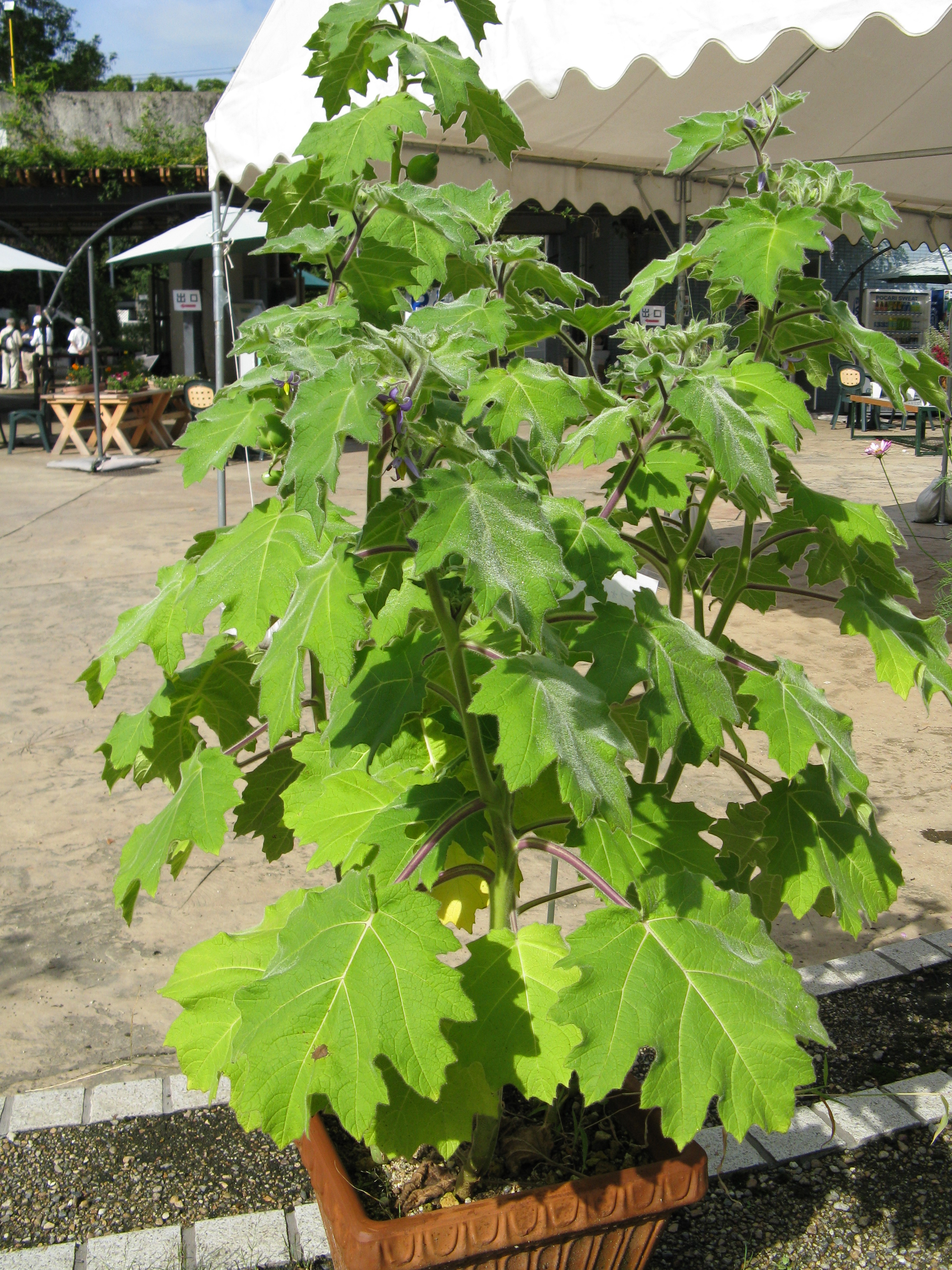 Scientific name Solanum mammosum